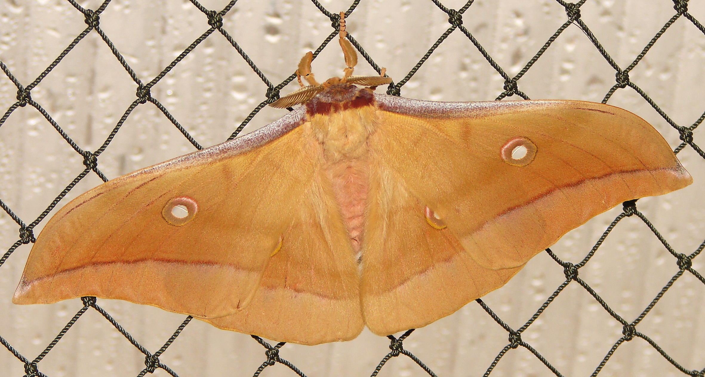 Antheraea pernyi, Czech Republic, Skleník Fata Morgána BZ Praha - Trója